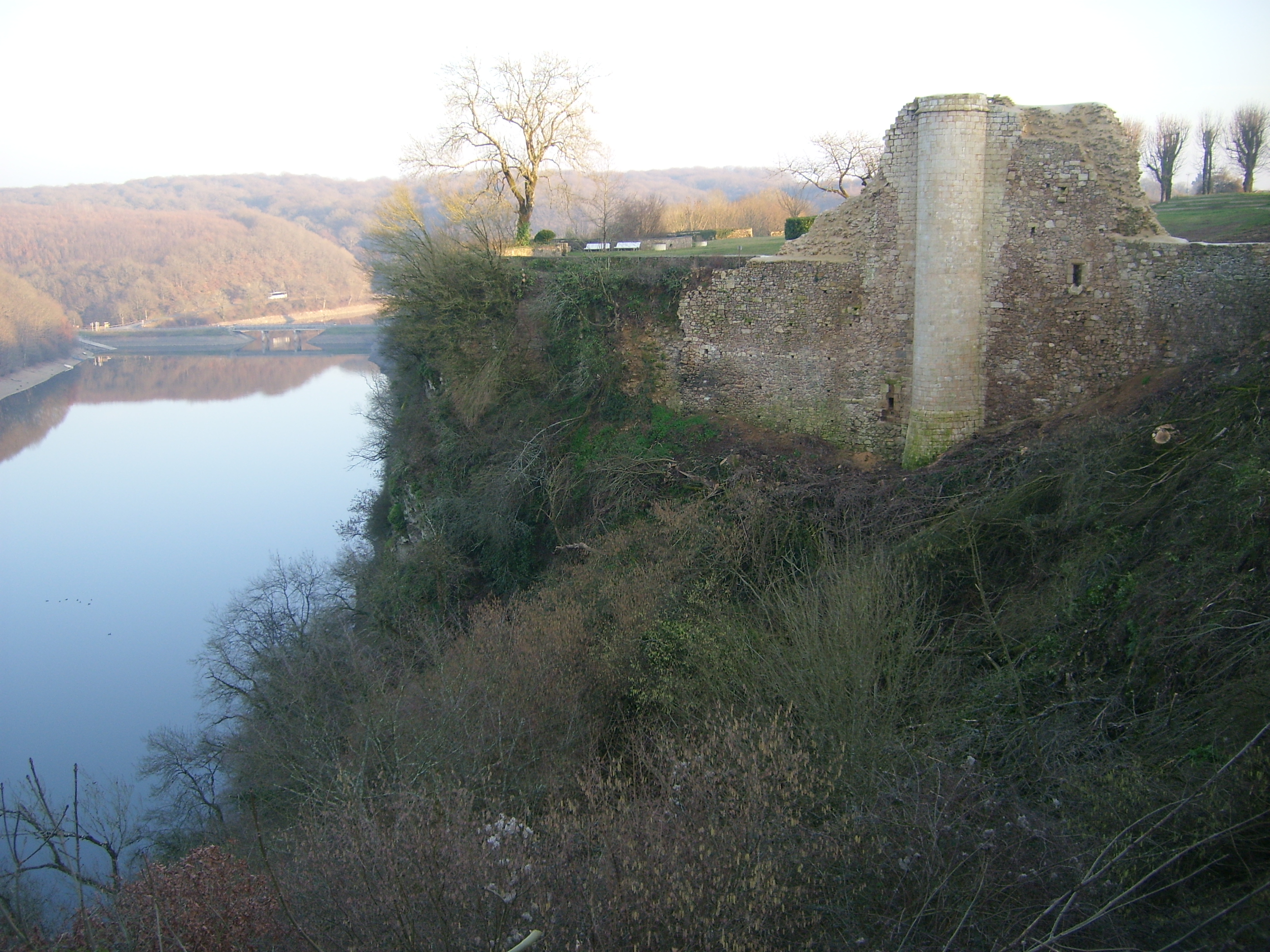 Vestige du Château Médiéval de Mervent (85)